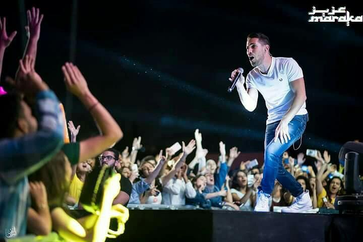 aziz maraka